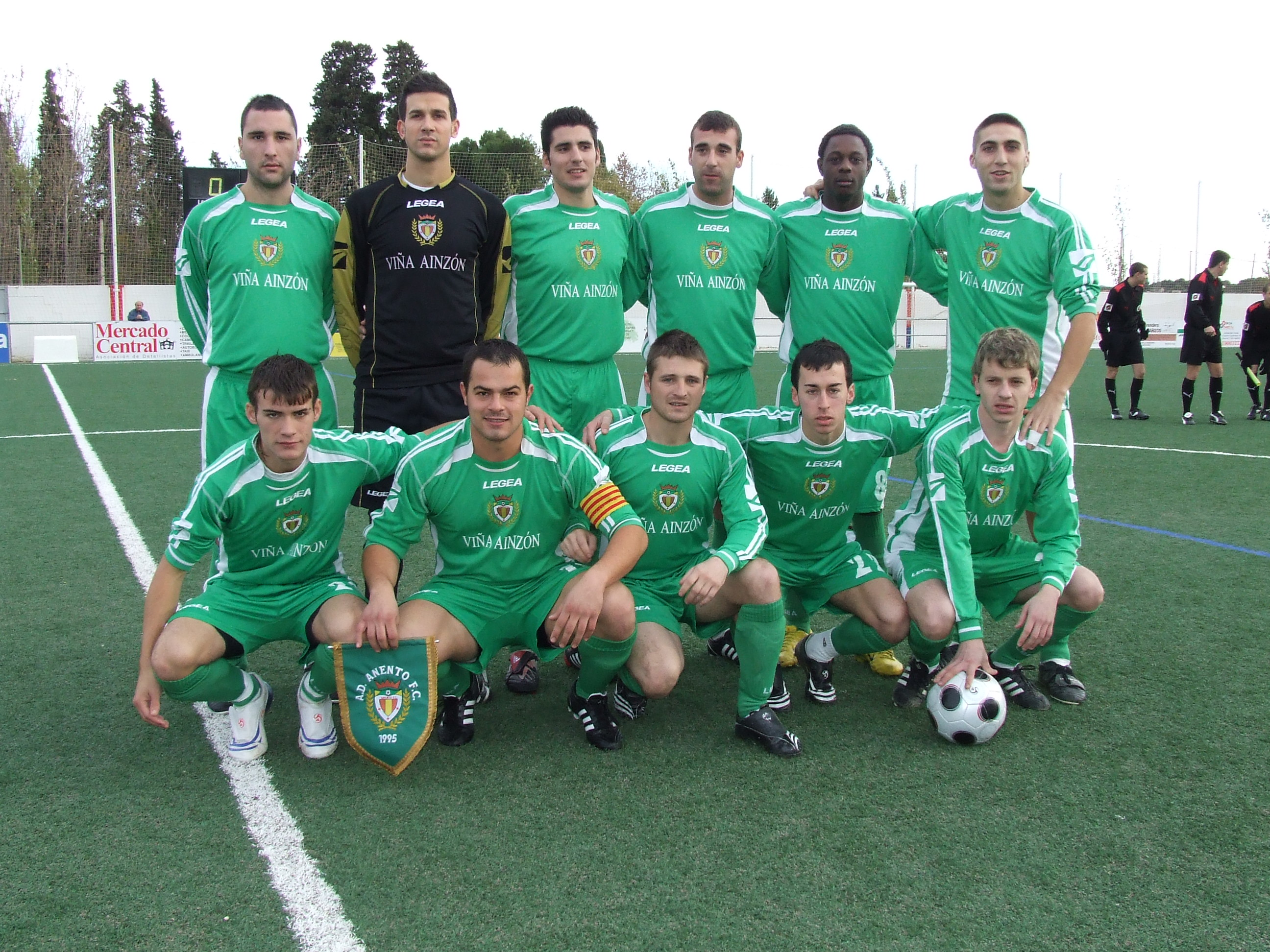 Anento (Anento 1 - Altorricón 1 (30112008))